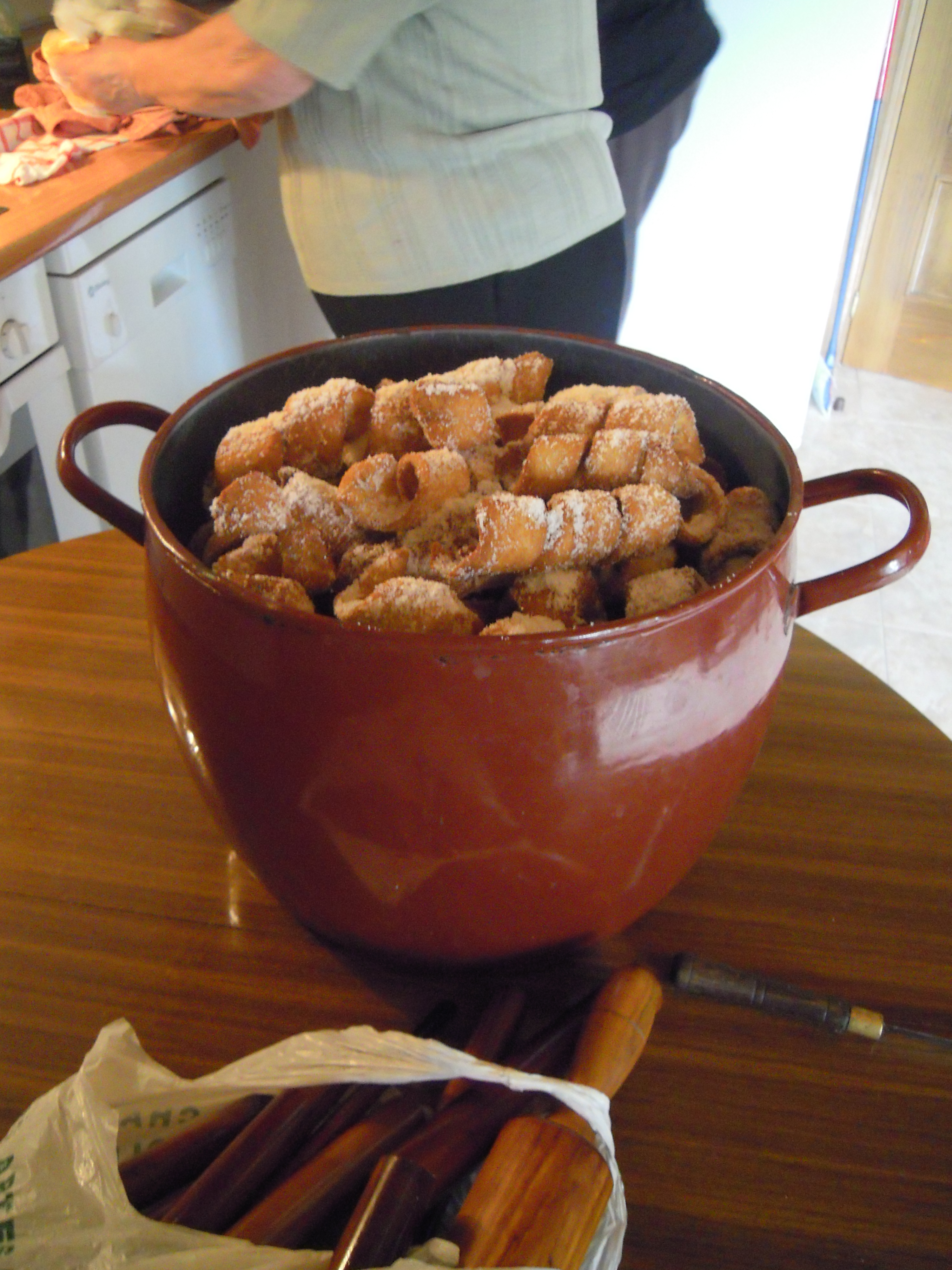 sacatrapos